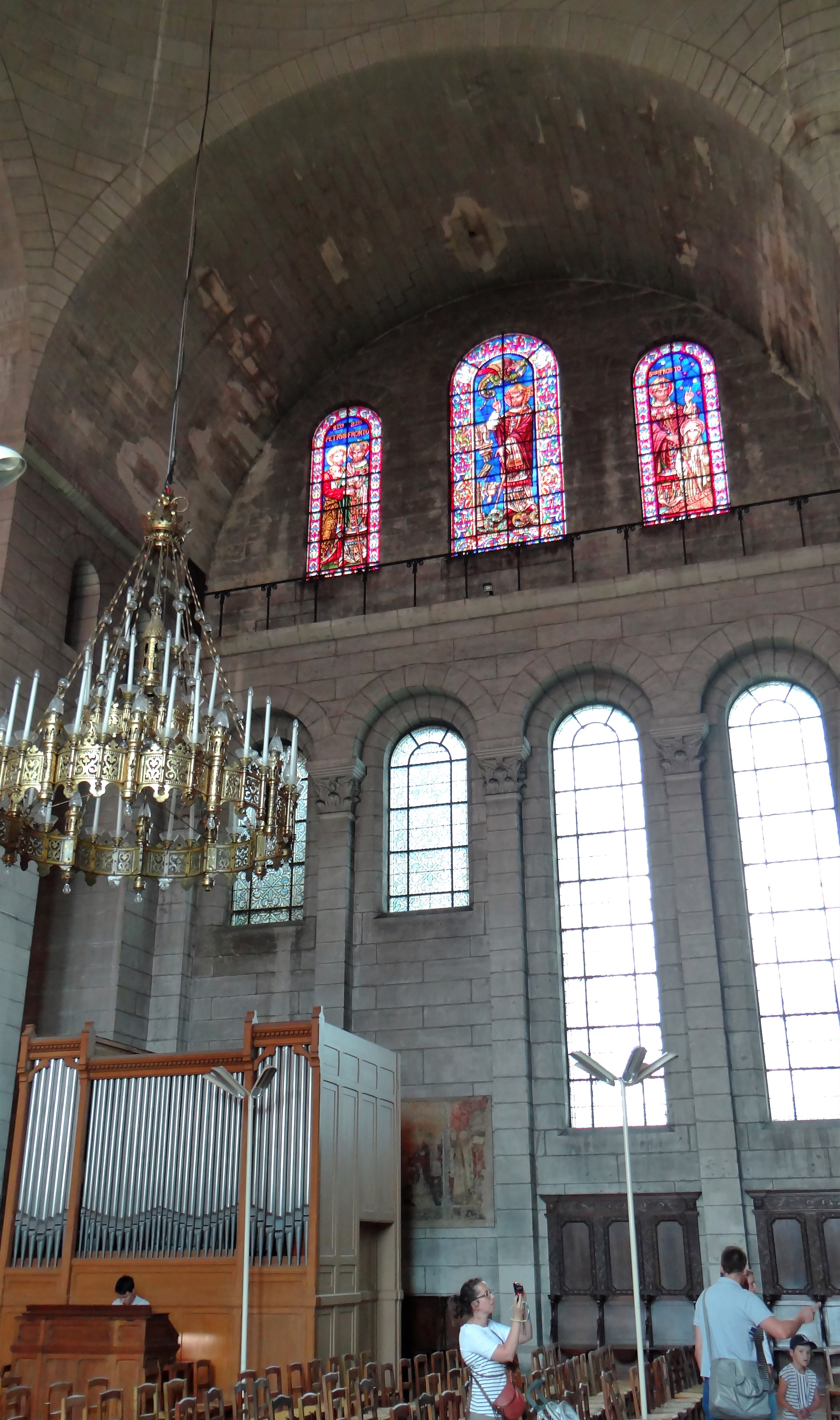 Périgueux - Cathédrale Saint-Front - Intérieur de la cathédrale : orgue de chœur .